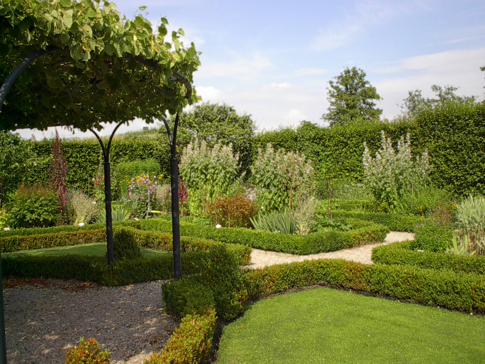 Kruidentuin bij het Muiderslot, The Netherlands